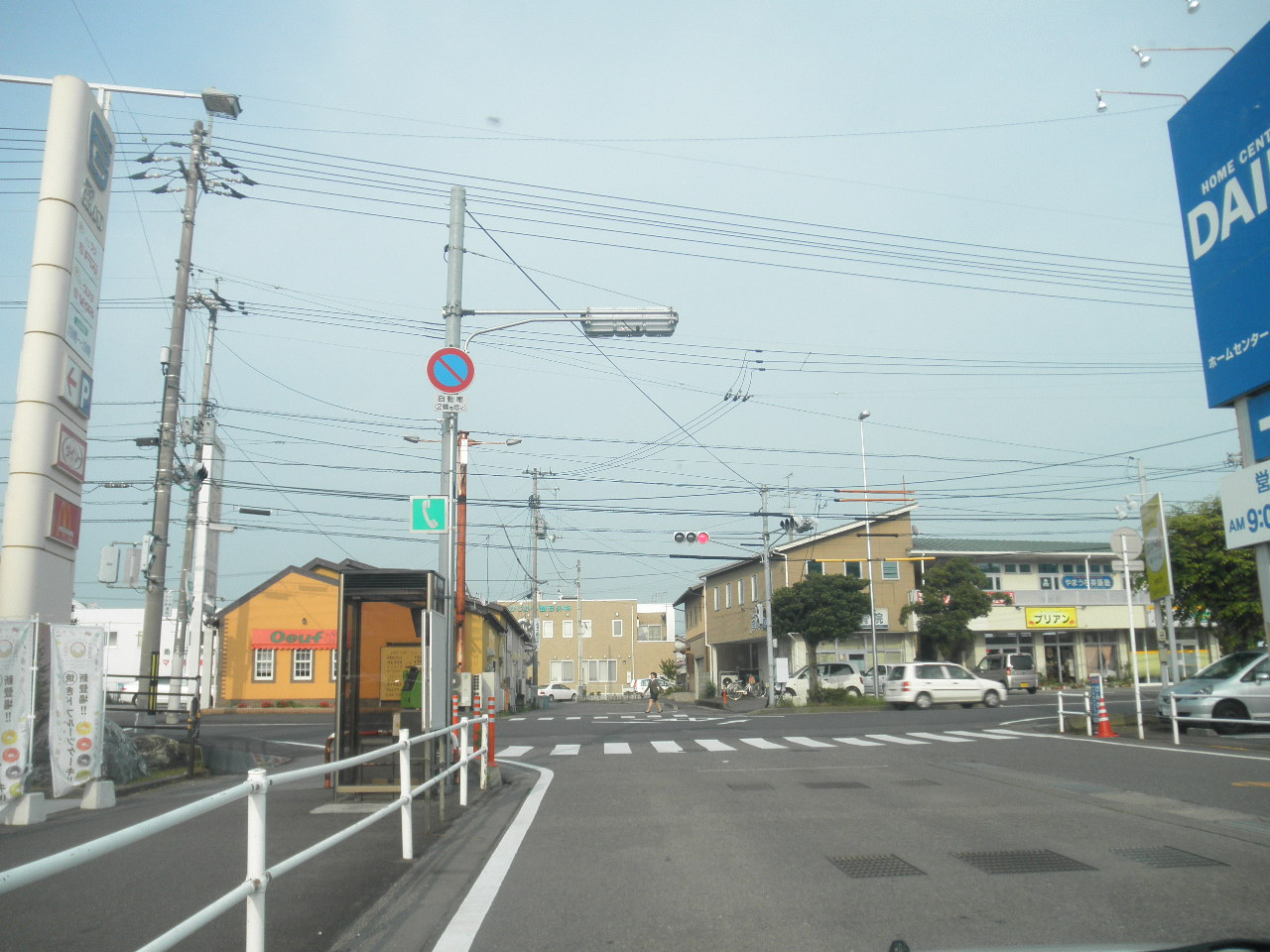 徳島県阿南市領家町土倉